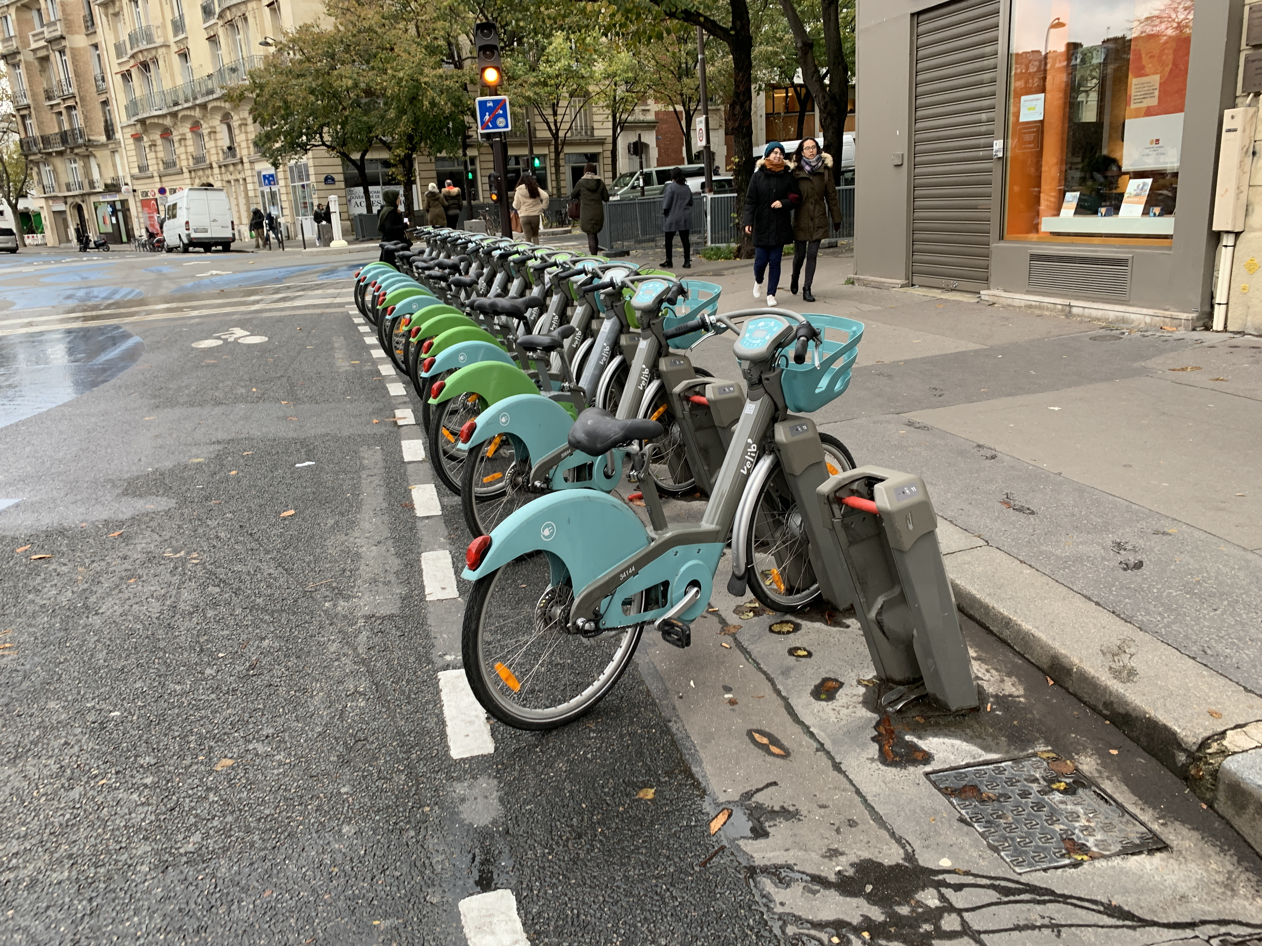 Station Vélib' Métropole Place de la Nation - Taillebourg, Paris.